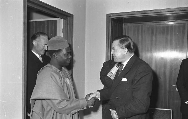 Ministerialdirigent Dr. Sachs empfängt den Postminister von Nigeria im Auswärtigen Amt zu Wirtschaftsbesprechungen